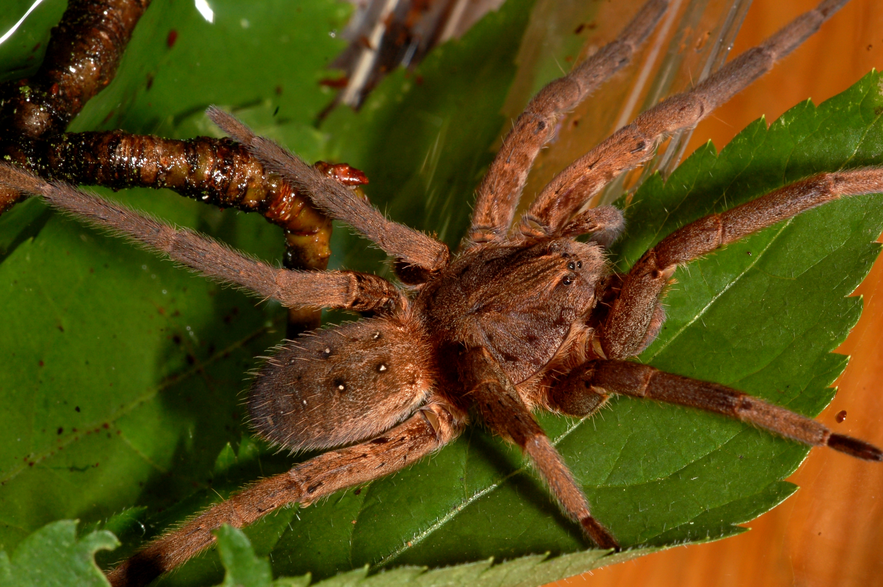 Wasserjagdspinne Ancylometes bogotensis (Fam. Ctenidae) in Gefangenschaft, Museum Wiesbaden, Deutschland